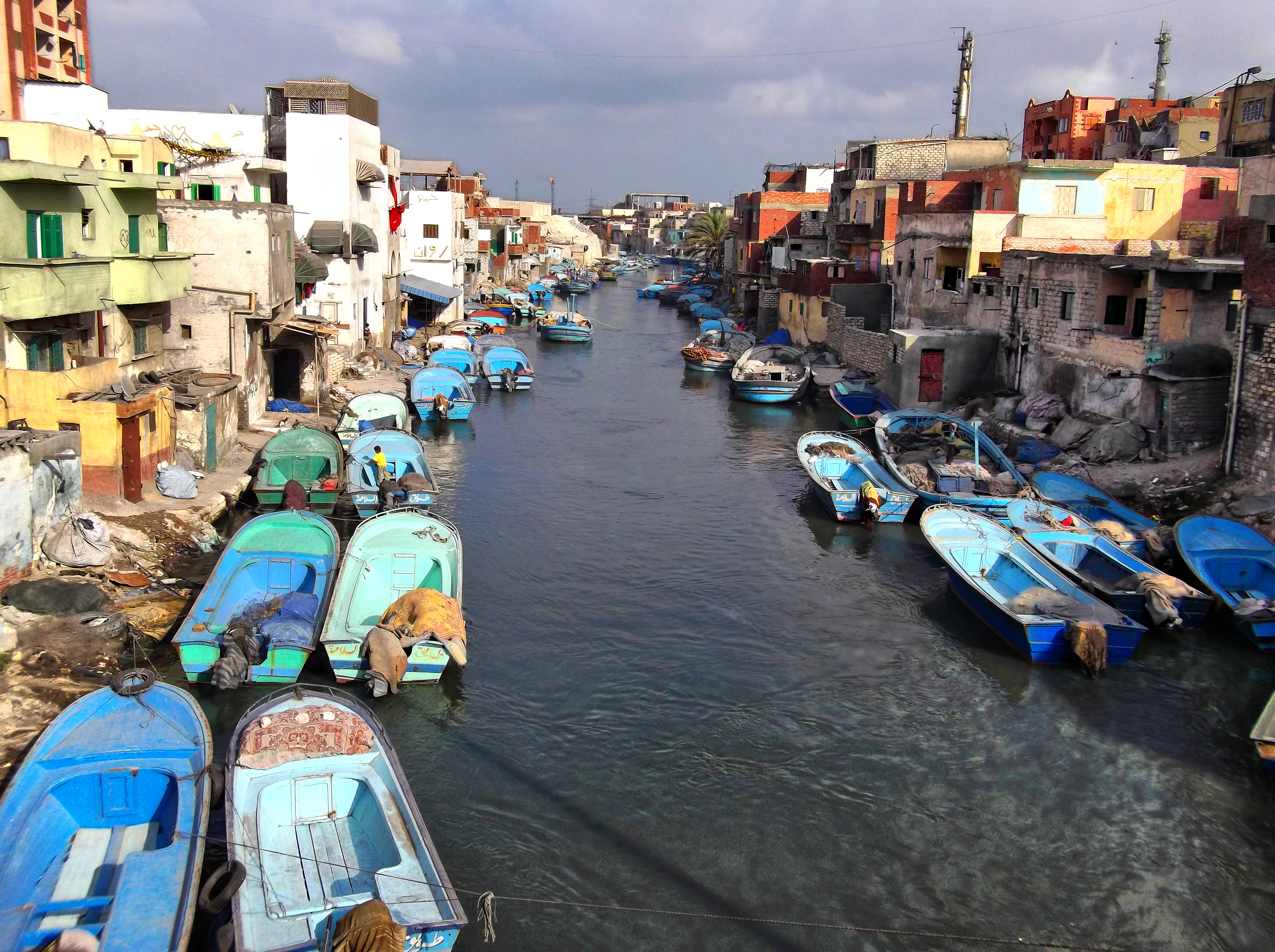 المكس